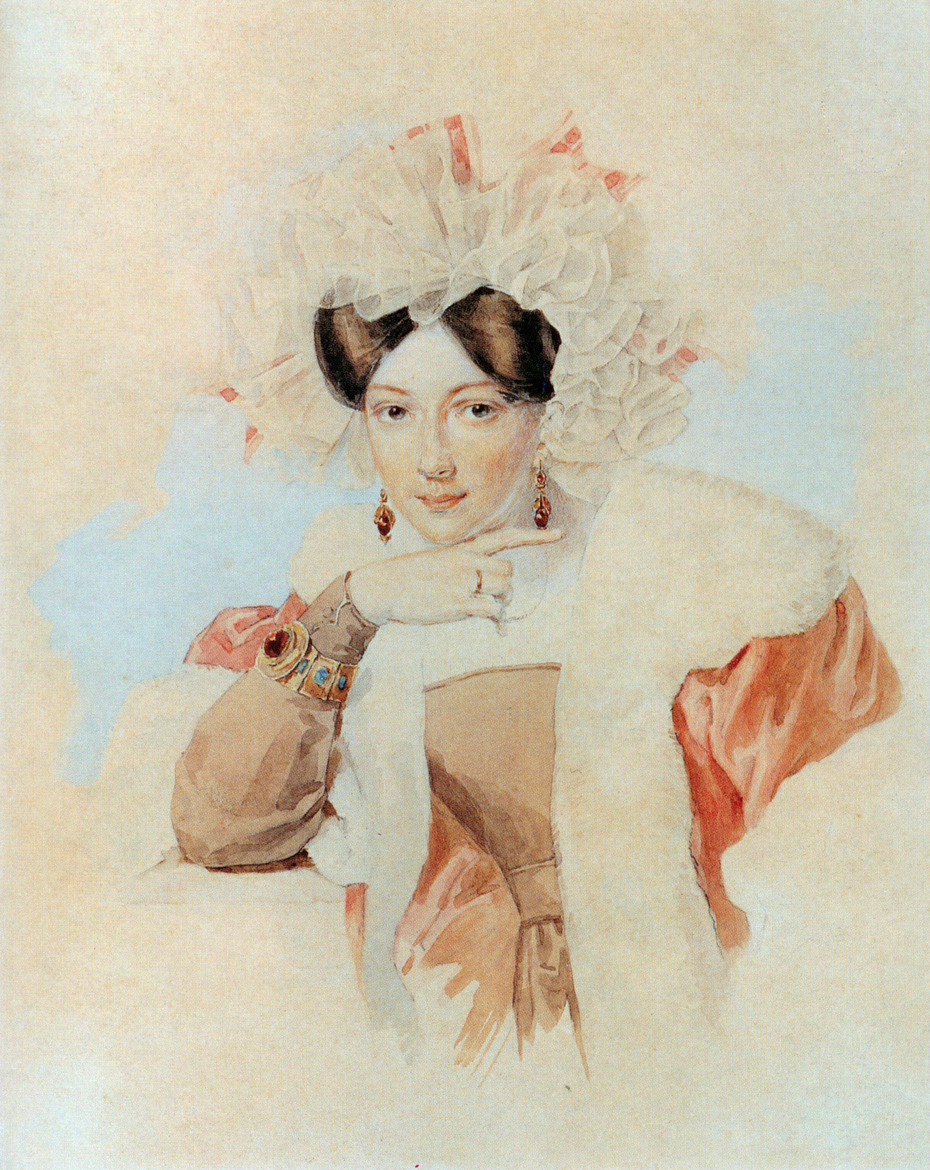 П.Ф.Соколов. Портрет Ю.П.Соколовой. Около 1827. Бумага, акварель, лак. Государственный музей А.С.Пушкина Юлия Павловна Соколова, урожденная Брюлло (около 1804–1877), сестра К.П. и А.П. Брюлловых, с 1820 года жена П.Ф.Соколова.